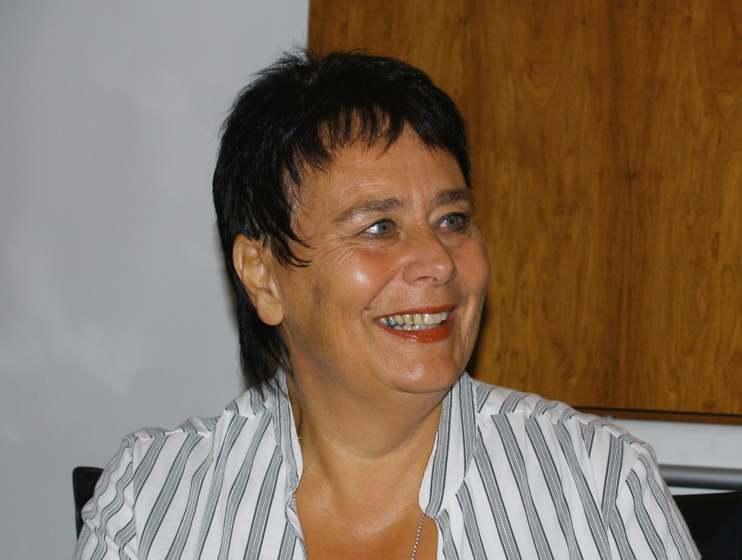 Solveig Fiske, bishop in Hamar, Norway, 2006